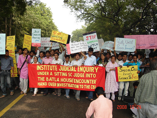 jamia 040